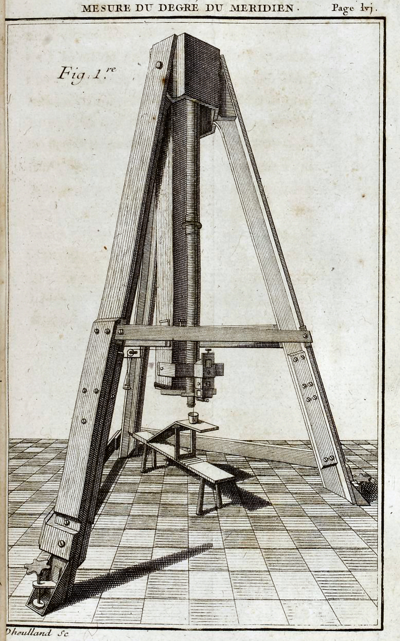 Le secteur de Graham (1735) utilisé par Maupertuis en Laponie et sur la méridienne de Picard à Malvoisine et Amiens.